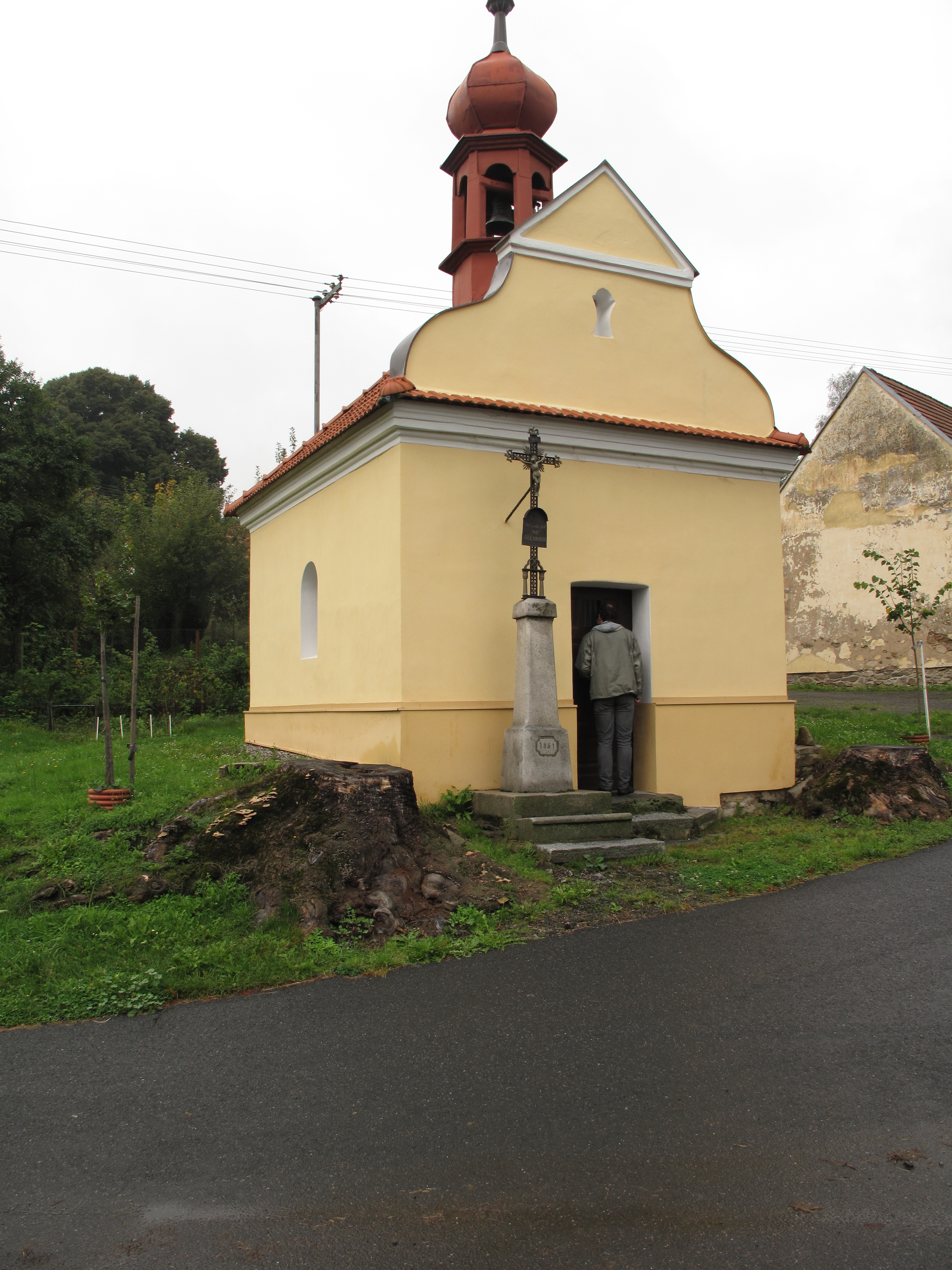 Kaplička v Dřešínku. Okres Strakonice, Česká republika.